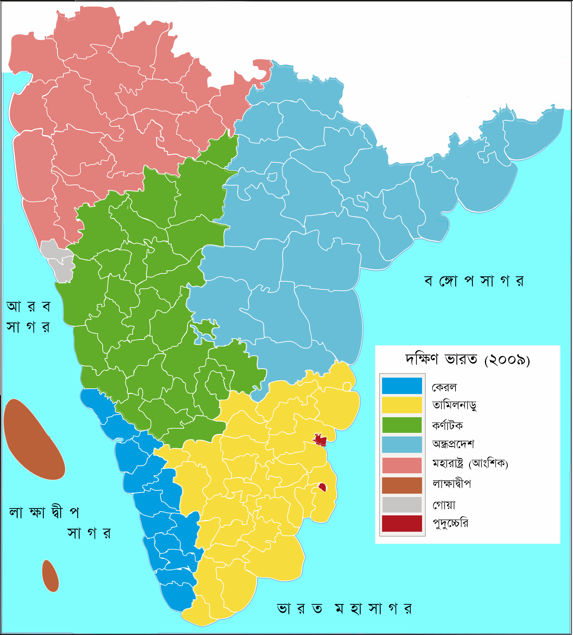 Politische Gliederung Südindiens 2009 Original upload log This image is a derivative work of the following images: File:South_Indian_territories.svg licensed with Cc-by-3.0, GFDL 2008-06-13T01:35:56Z File Upload Bot (Magnus Manske) 693x748 (724956 Bytes) Information |Description= en| :bn::en:South India| n states prior to the :bn::en:States Reorganisation Act| (1956) == Source data and maps == 1. Nizam's Territories: Uploaded with derivativeFX Category:States and territories of India Category:Maps of South India Category:Travancore Category:Satavahana Category:Hyderabad State Category:Mysore Kingdom]